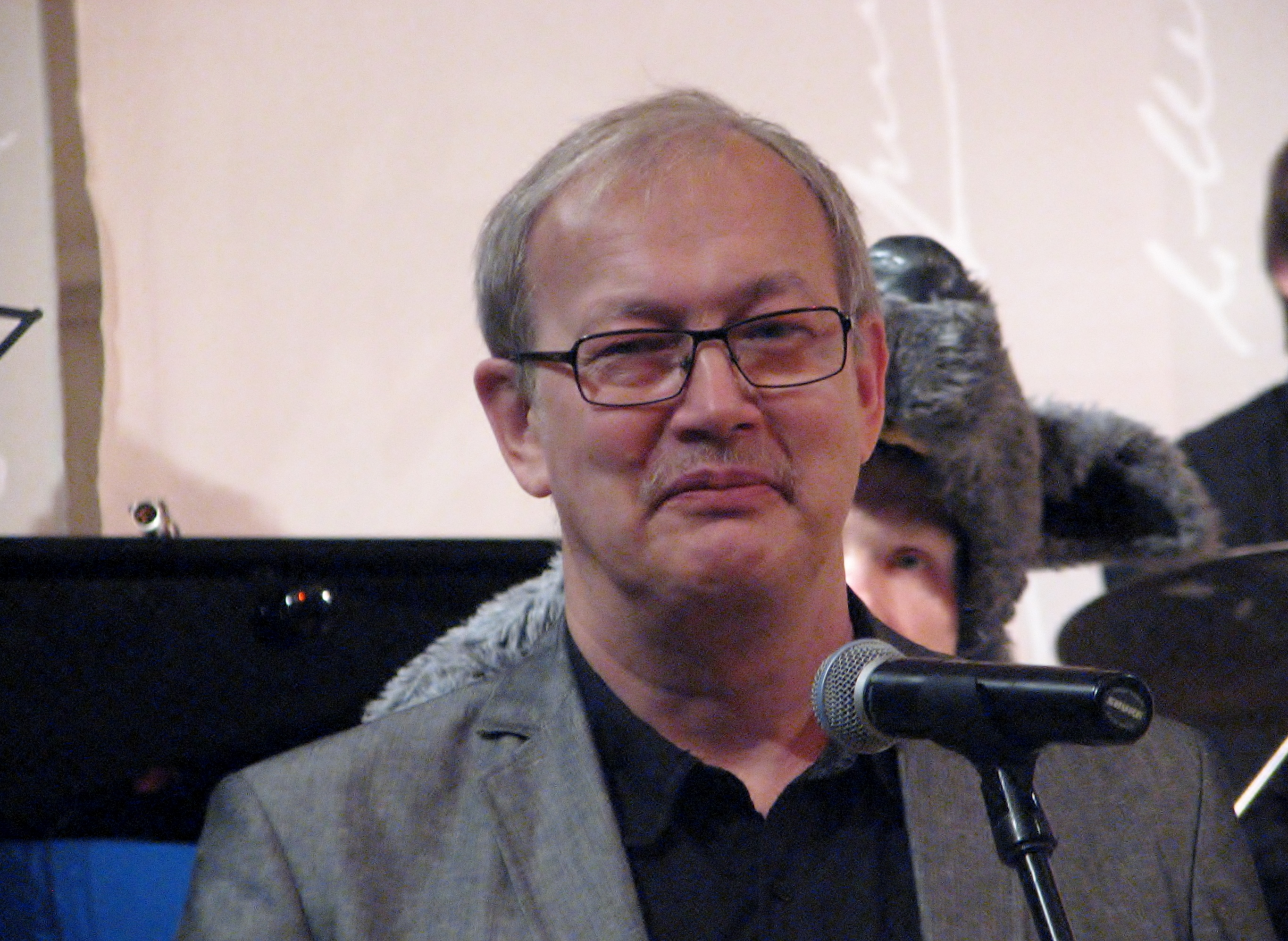 Heiki Ernits Nukitsa konkursi auhindade üleandmistseremoonial